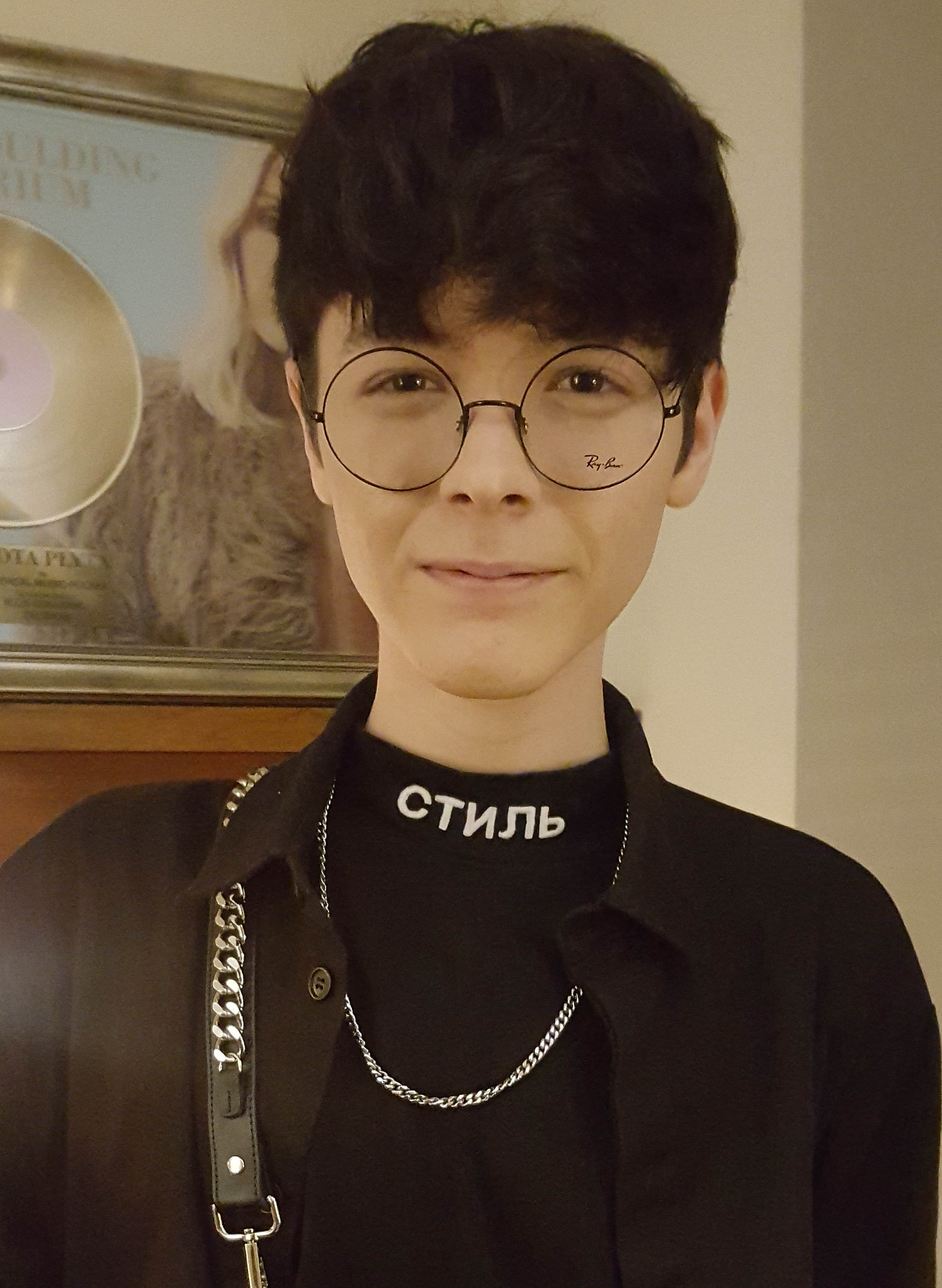 Bułgarsko-rosyjski piosenkarz Kristian Kostow podczas pobytu w Warszawie, 4 grudnia 2018.